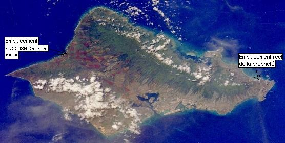 Image Satellite de Oahu (Hawaii) avec indications sur l'emplacement de Robin's Nest (Magnum)